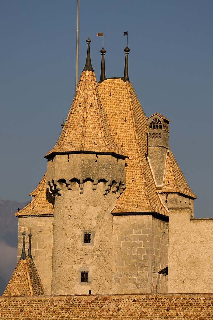 Der viereckige Turm des Schlosses in Aigle